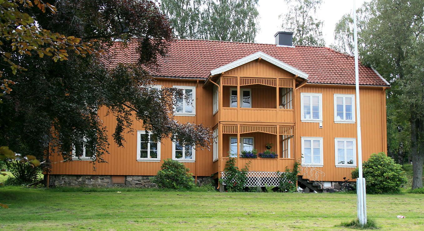 Brårudgården, Horten.